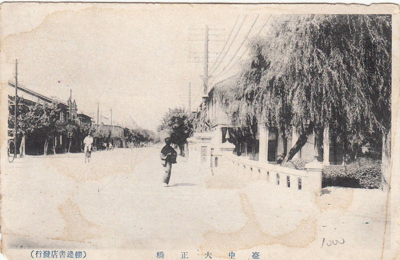 日本時代的臺中大正橋，位於臺中市民權路上